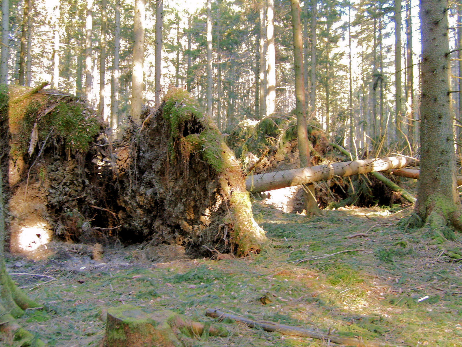 Windbruch- Fichten nahe Nußdorf, zwischen Heuberg und Kranzhorn.